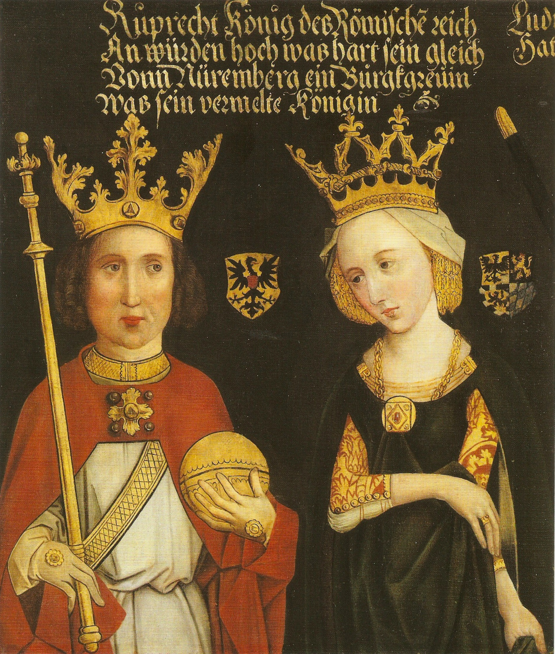 Depicted people: Ruprecht von der Pfalz and Elisabeth von Hohenzollern-Nürnberg